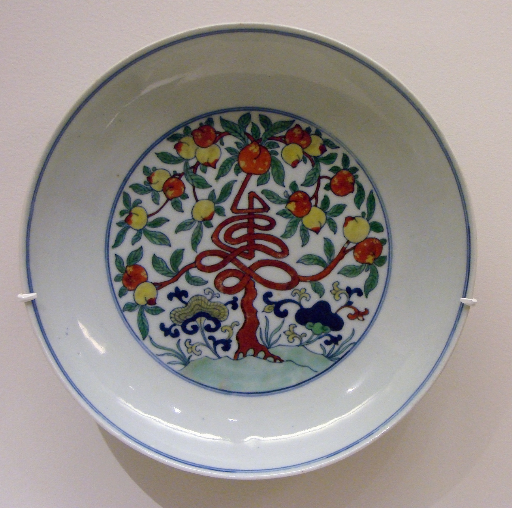 Plat à décor de pêcher, dont le tronc forme le caractère shou (longévité).Période Kangxi (1662-1722),début du 18ème siècle, marque d'atelier Haoran Tang (Pavillon de l'Immensité) sous la base. Musée Guimet, Paris.